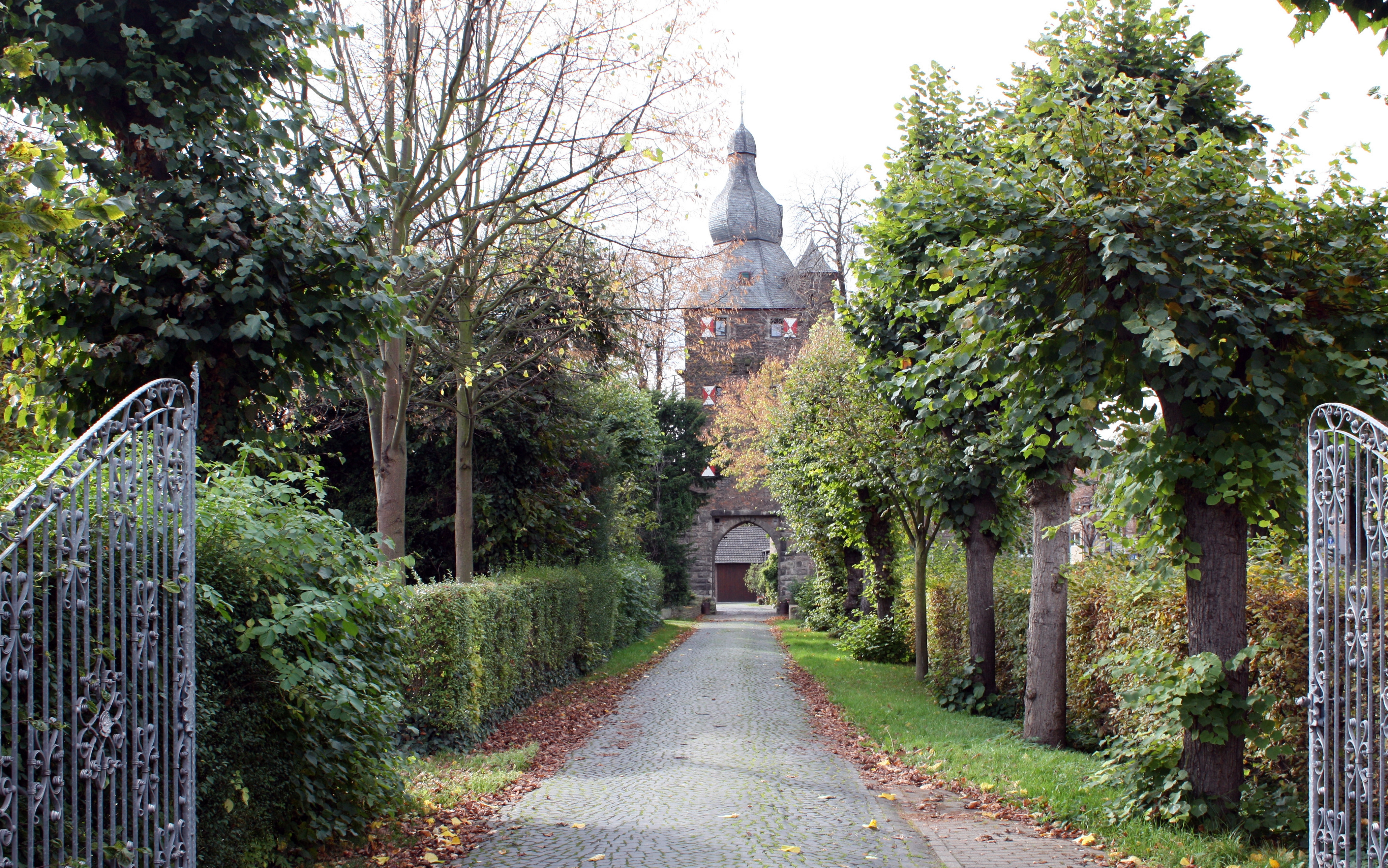 Burg Efferen, Zugang